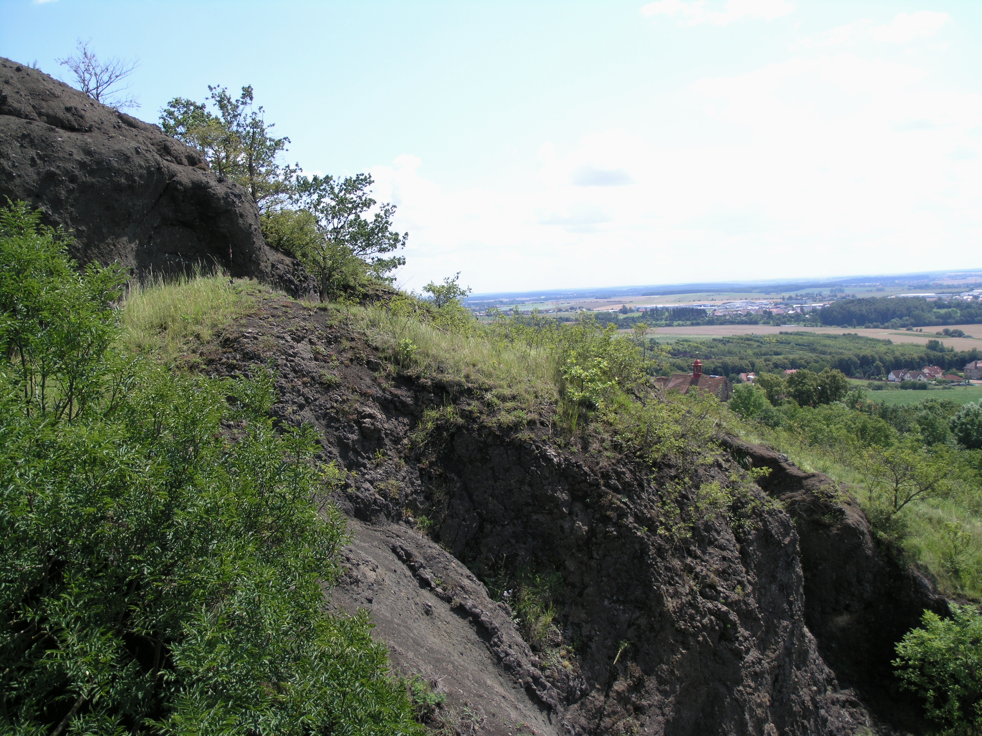 Vrch Zebín